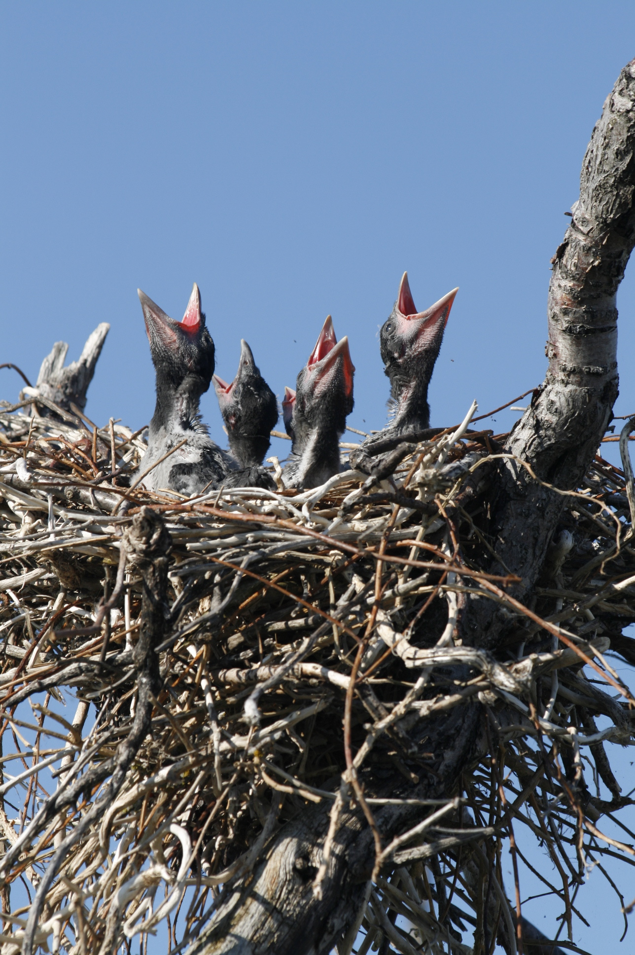 Varesepojad vanas kormorani pesas, Hanilaid Pärnumaal